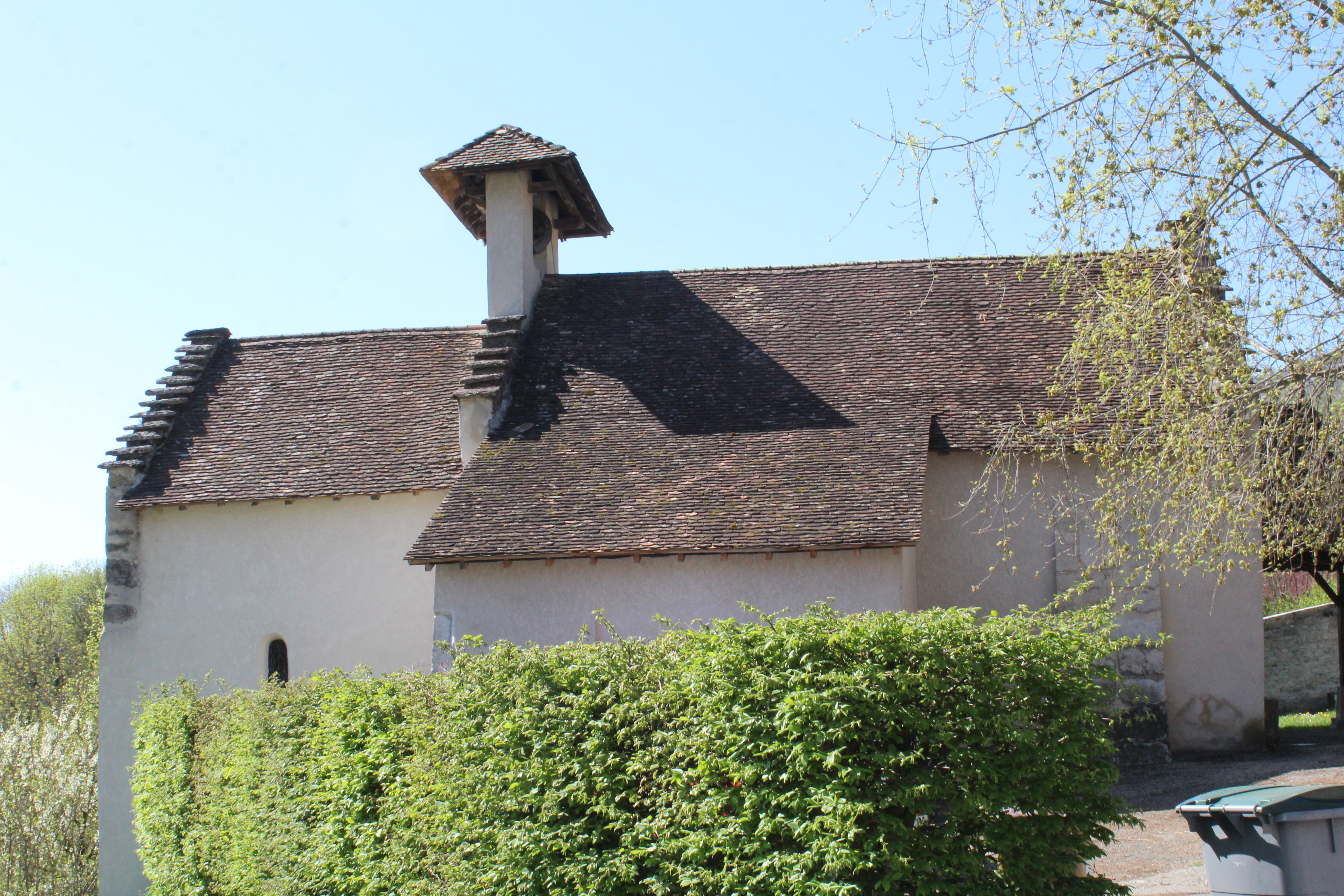 Chapelle Saint-Désiré d'Ambléon.